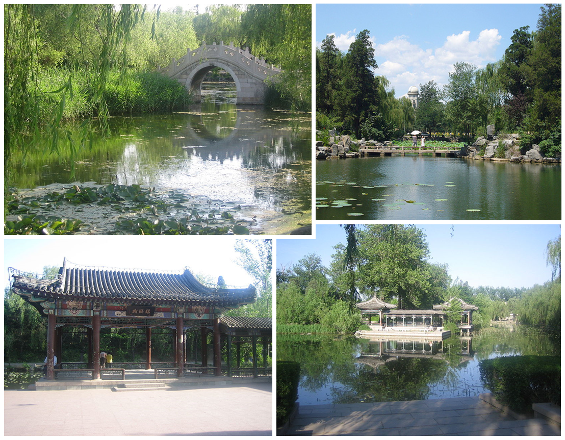 近春园组图